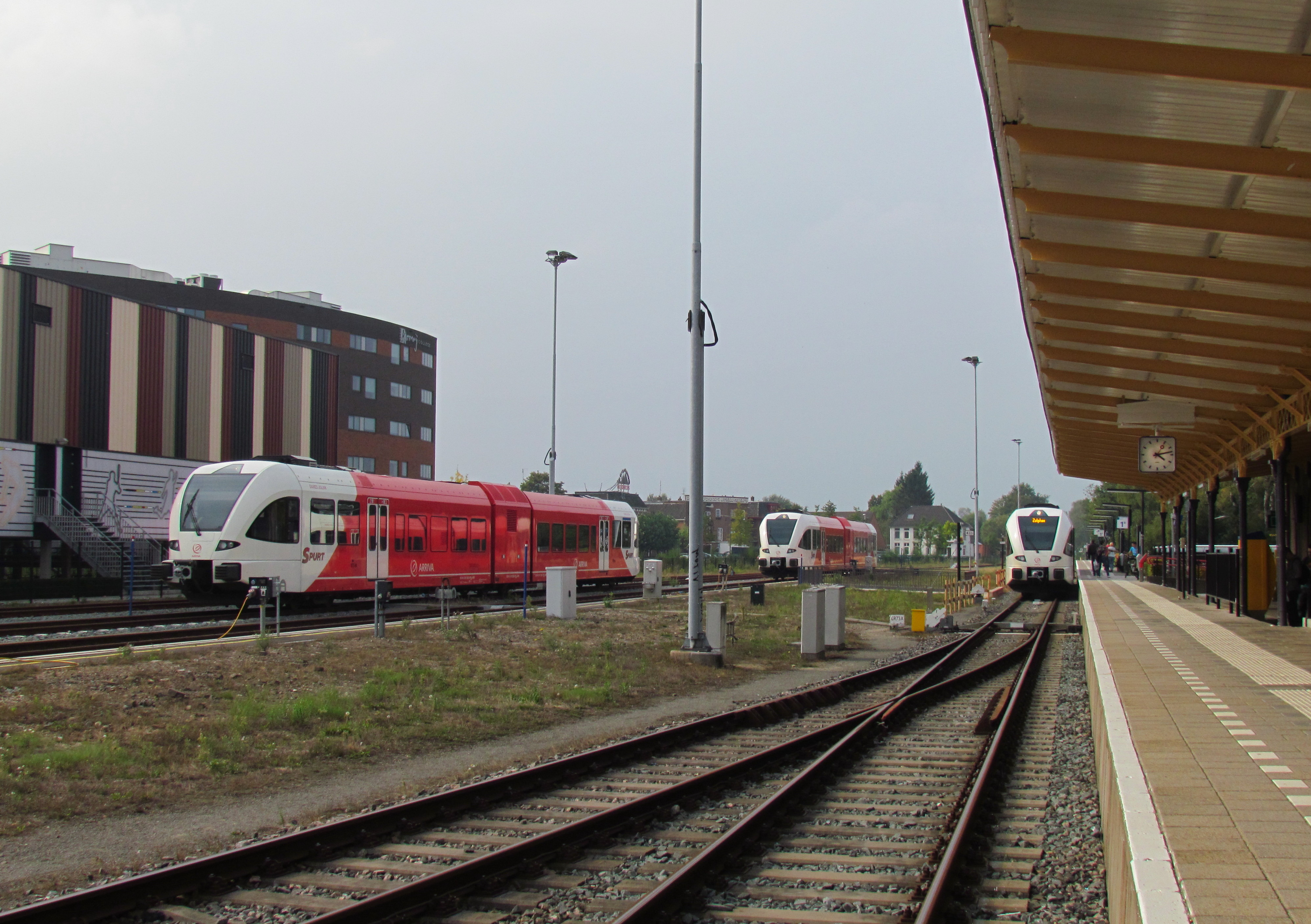 Drie Arriva Spurts op station Winterswijk. Links het Komrij College